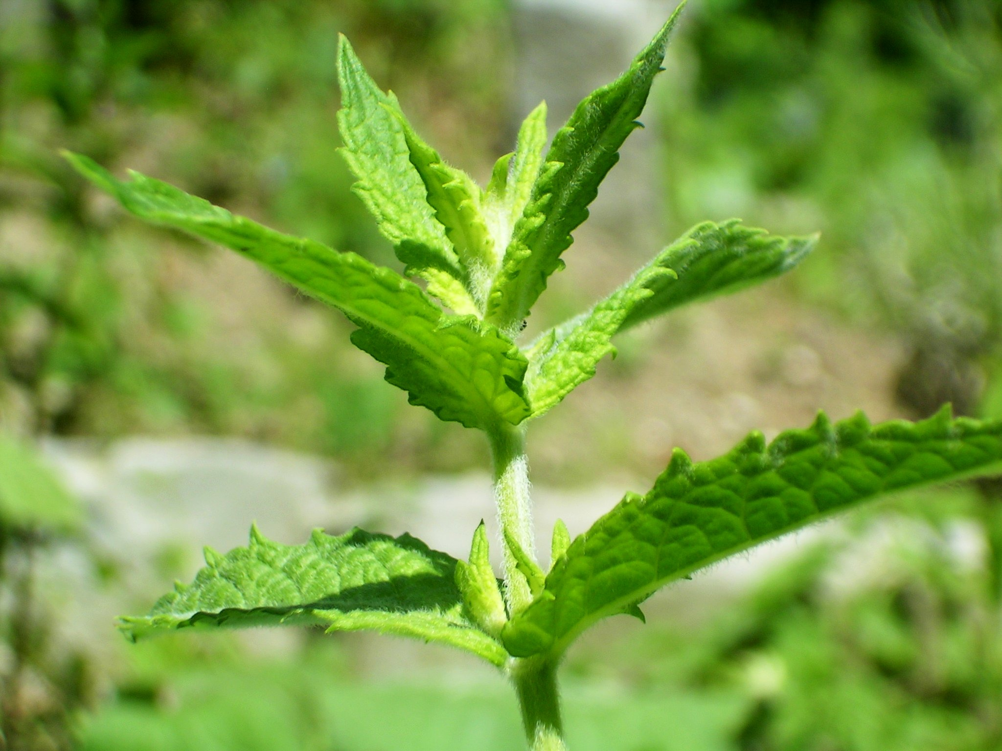 (en) Spearmint (Mentha spicata) (de) Grüne Minze (Mentha spicata) Aufnahmeort: Schweiz Bearbeitung: GIMP Kontrast angepasst (Kurven) Helligkeitswert angepasst